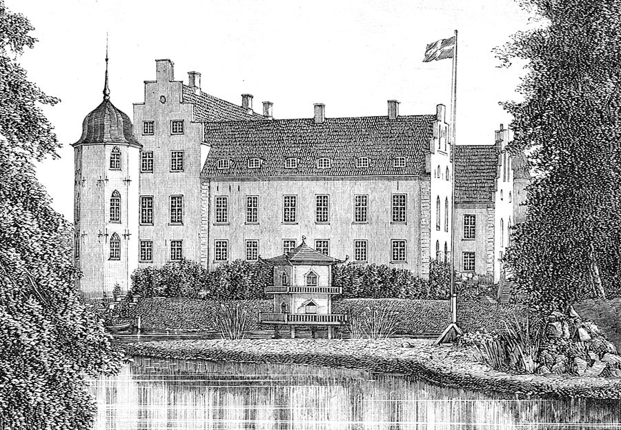 Krenkerup er en gammel landsbyhovedgård, som nævnes første gang i 1330. Krenkerup blev kaldt Hardenberg fra 1815 til 1938. Gården ligger i Radsted Sogn, Musse Herred, Maribo Amt, Sakskøbing Kommune. Hovedbygningen er opført i 1490-1510